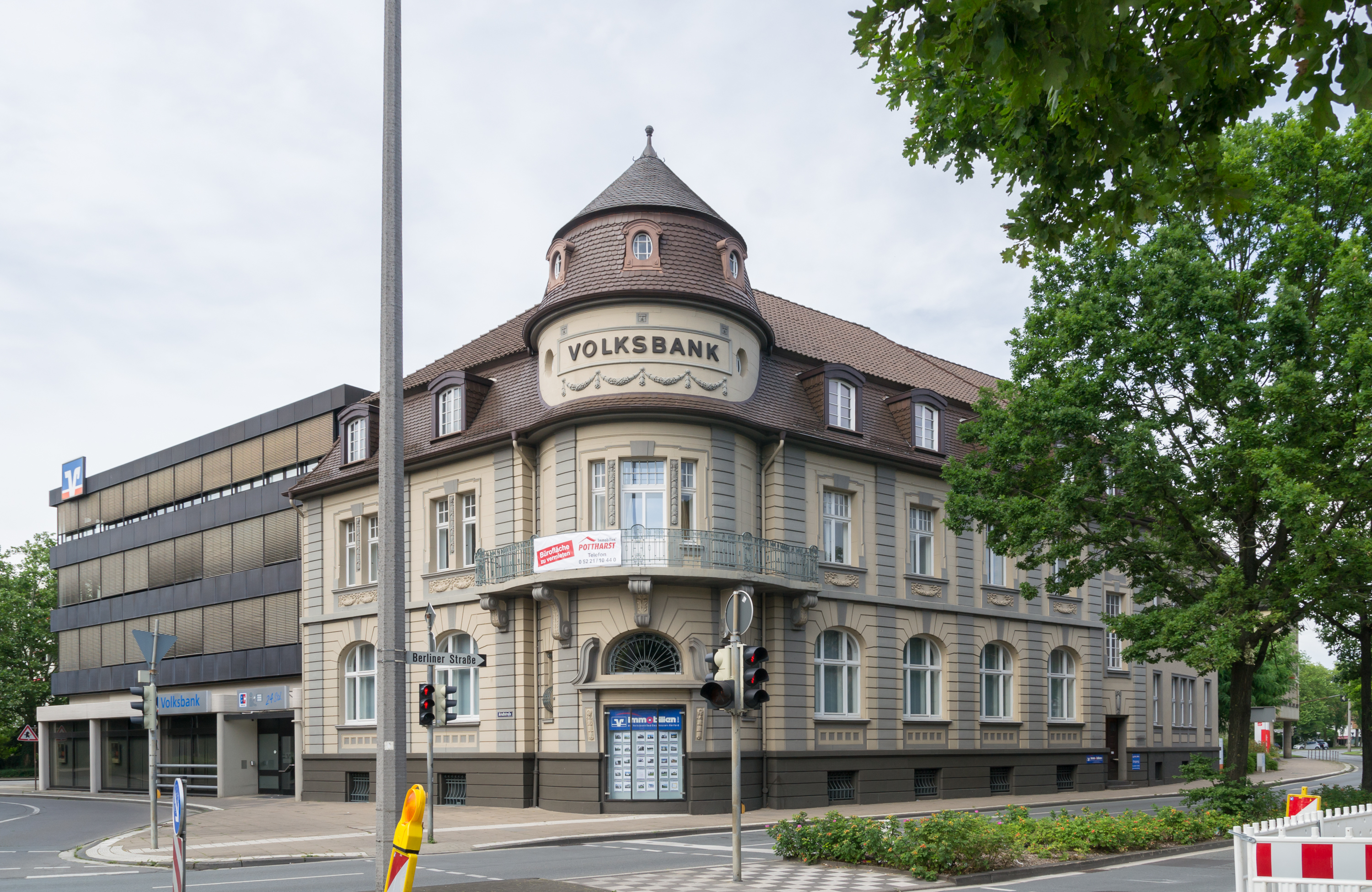 This image shows a heritage building in Germany, located in the North Rhine-Westphalian city Herford (no. 169). Volksbank Herford